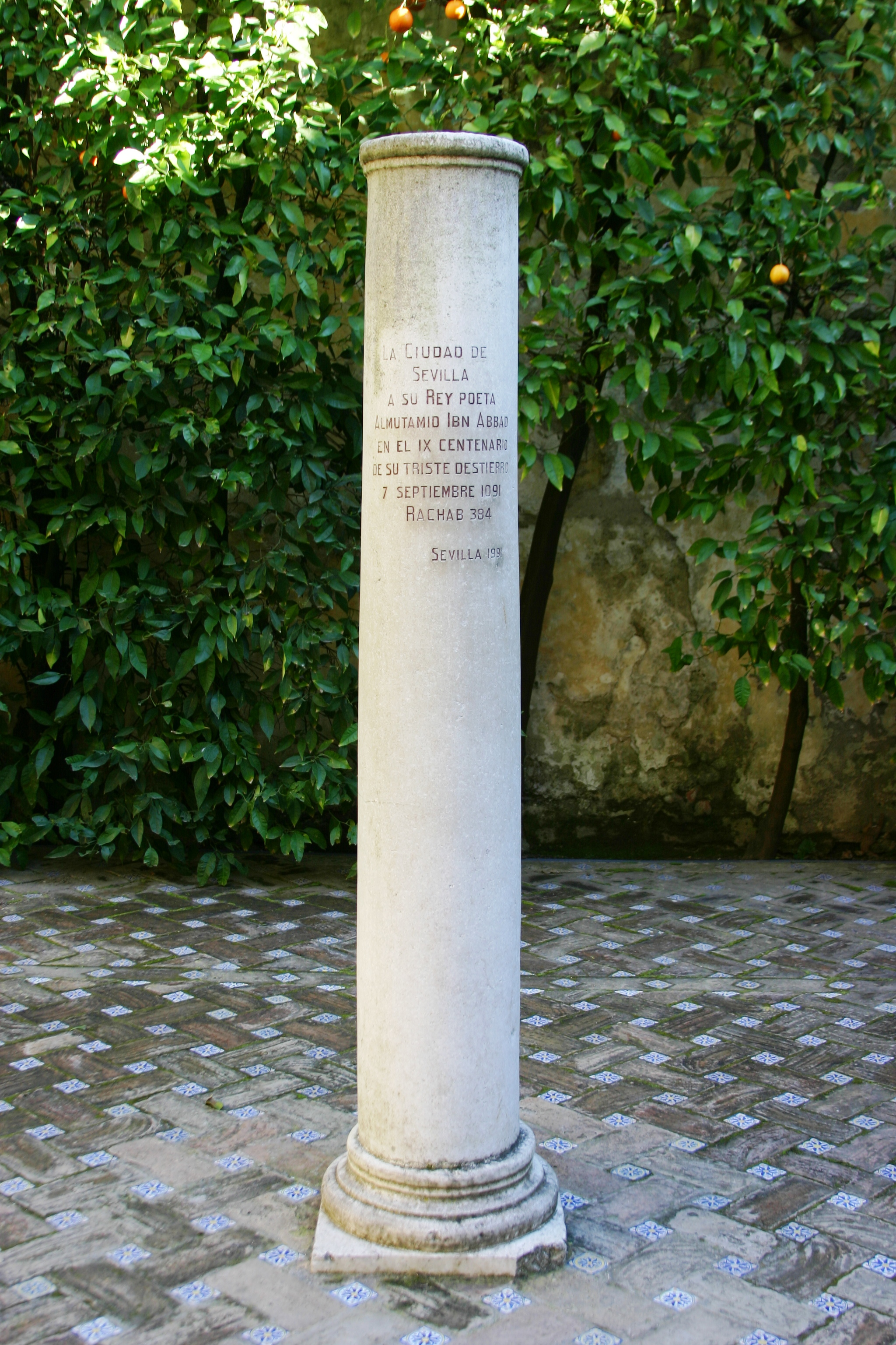 Coluna de Al-Mutamid